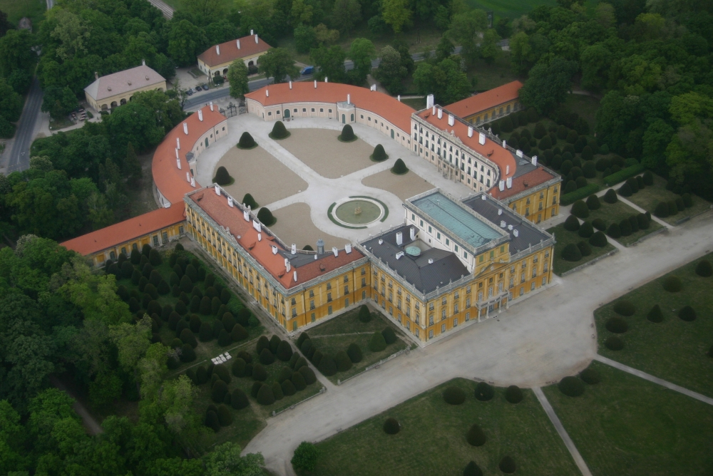 A fertődi Esterházy-kastély madártávlatból This is a photo of a monument in Hungary, Identifier: 4051